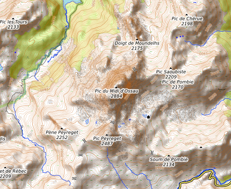 carte réalisée sur umap This map may be incomplete, and may contain errors. Don't rely solely on it for navigation.